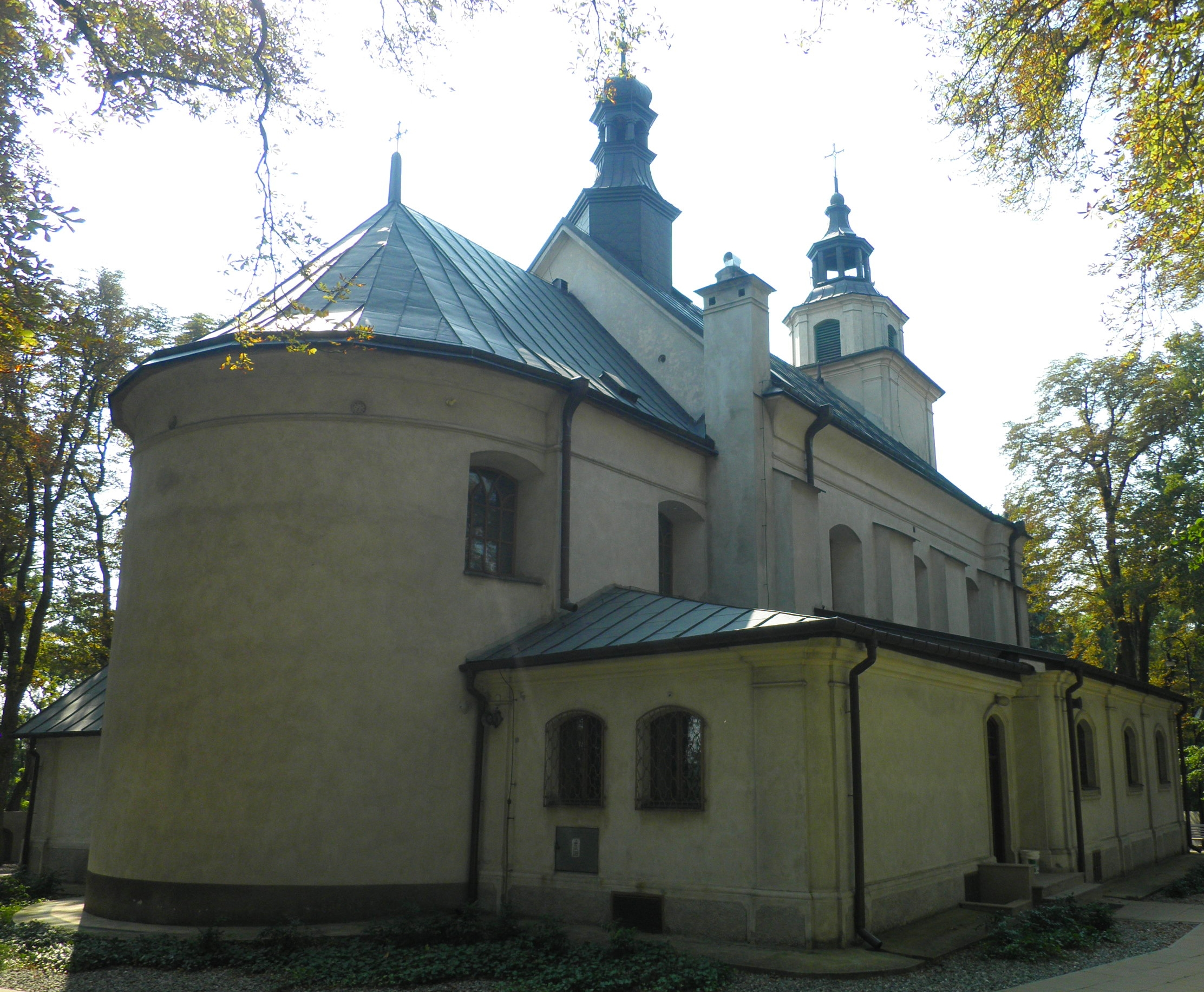 Kościół p.w. św. Jana Chrzciciela w Nałęczowie